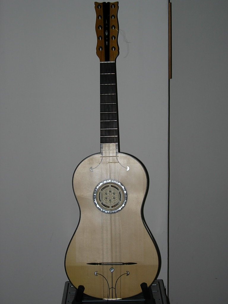 Foto mia personale, chitarra battente costruita da Pasquale Scala